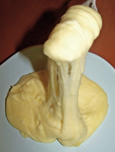 Assiette d'aligot (cuisine française)